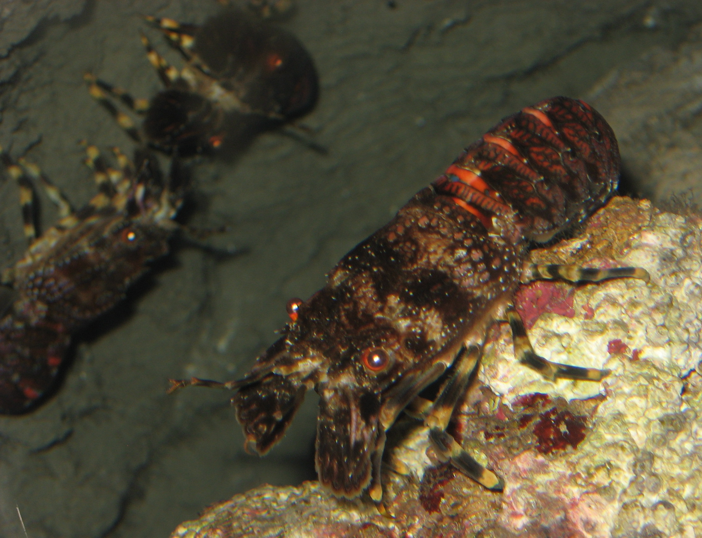 Scyllarus arctus in Aquarium Cinéaqua Map: 48° 51' 44" N 2° 17' 27" E